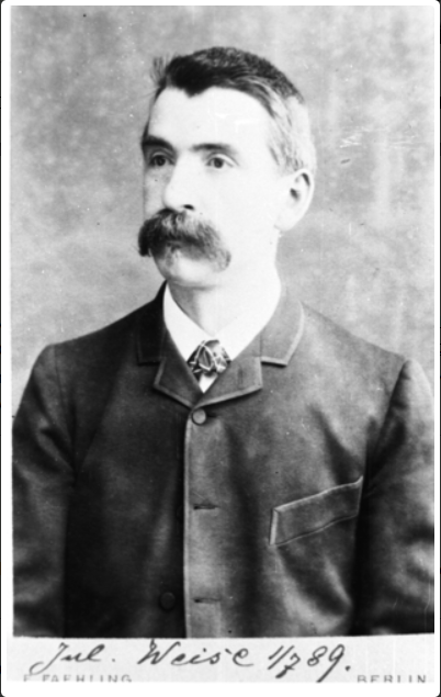 Ю́лиус Ва́йзе (1844-1925) — немецкий энтомолог